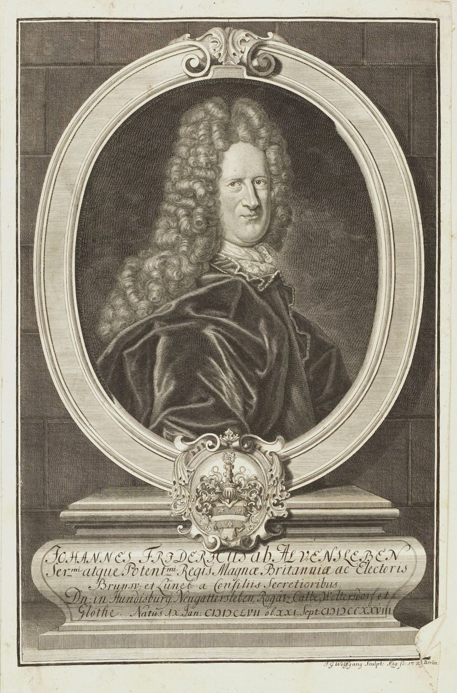 Grafik aus dem Klebeband Nr. 1 der Fürstlich Waldeckschen Hofbibliothek Arolsen Motiv: Johann Friedrich II. von Alvensleben (1657–1728), hannoverscher Minister